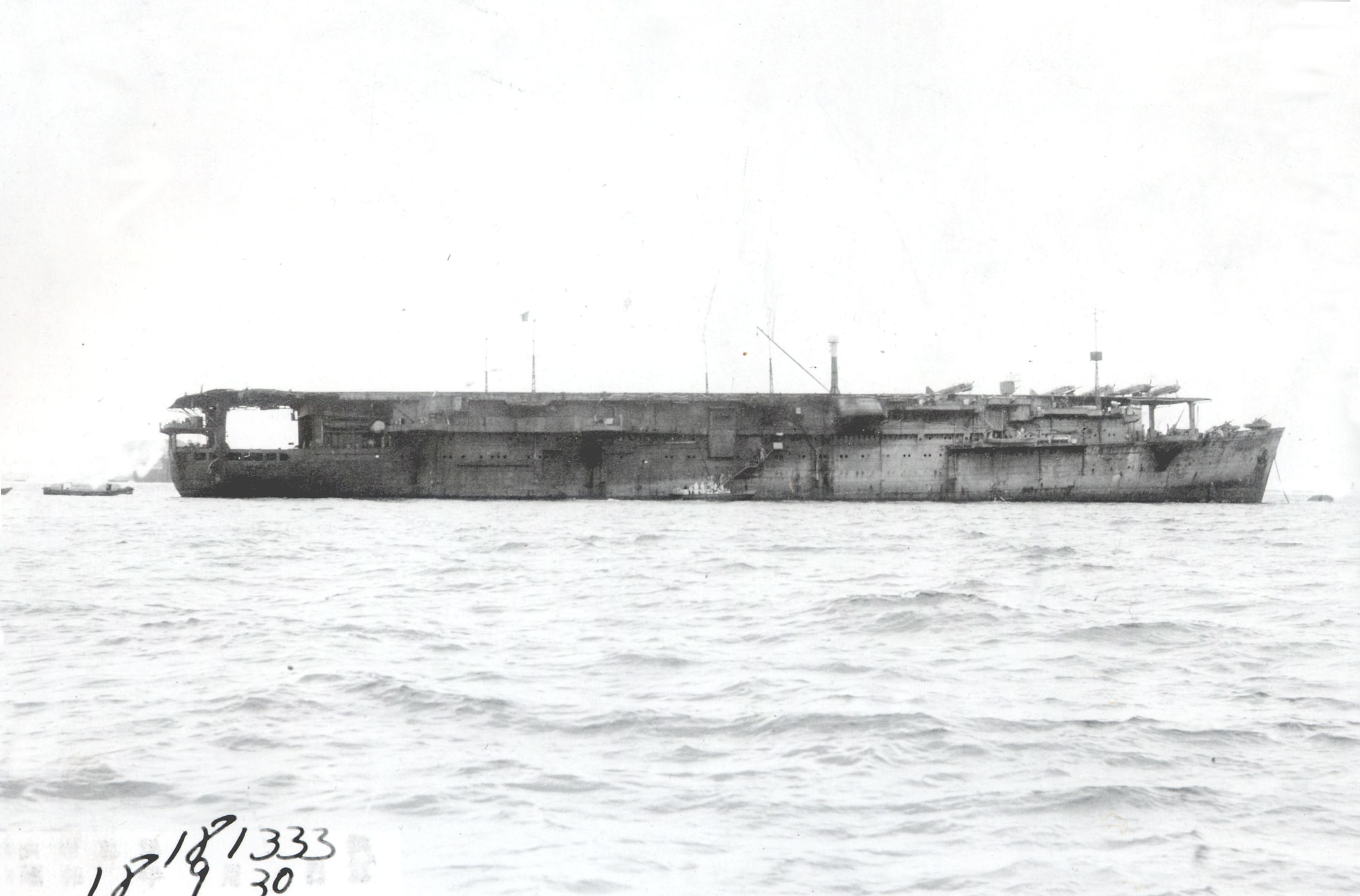 日本海軍航空母艦大鷹型「大鷹 横須賀にて停泊中の写真。